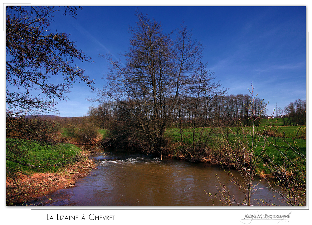 La Lizaine entre Luze et Héricourt